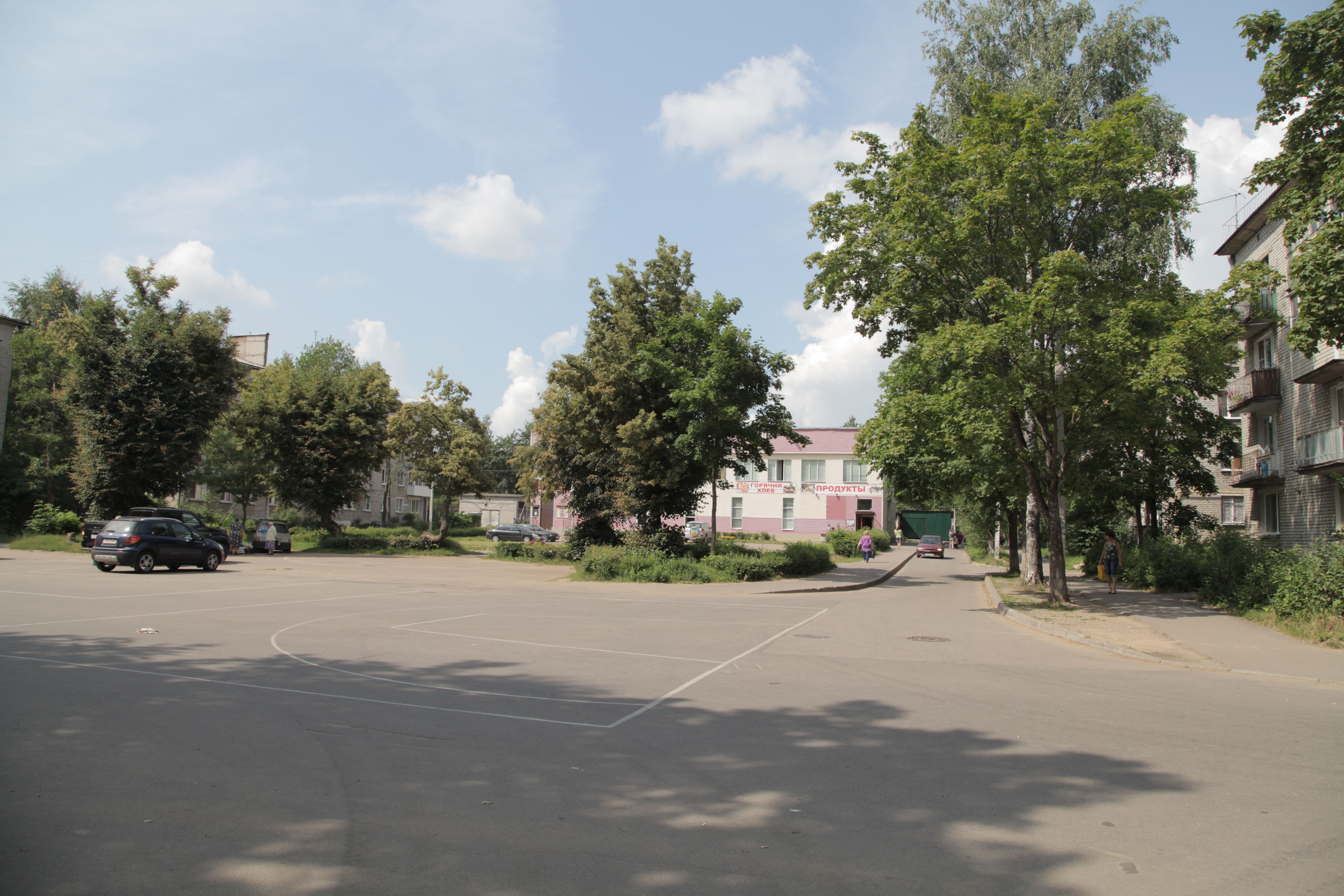 Кузьмоловский